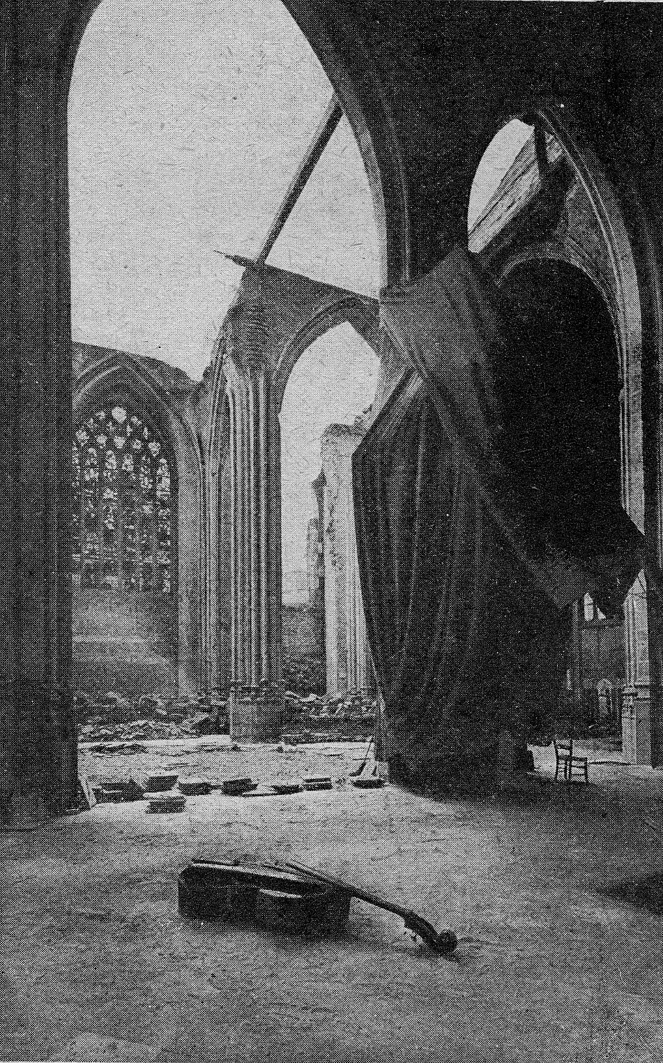 Saint-Eloi church in Dunkerque during World War 1 : "L'église Saint-Eloi, ravagée par les avions et les zeppelins ennemis"